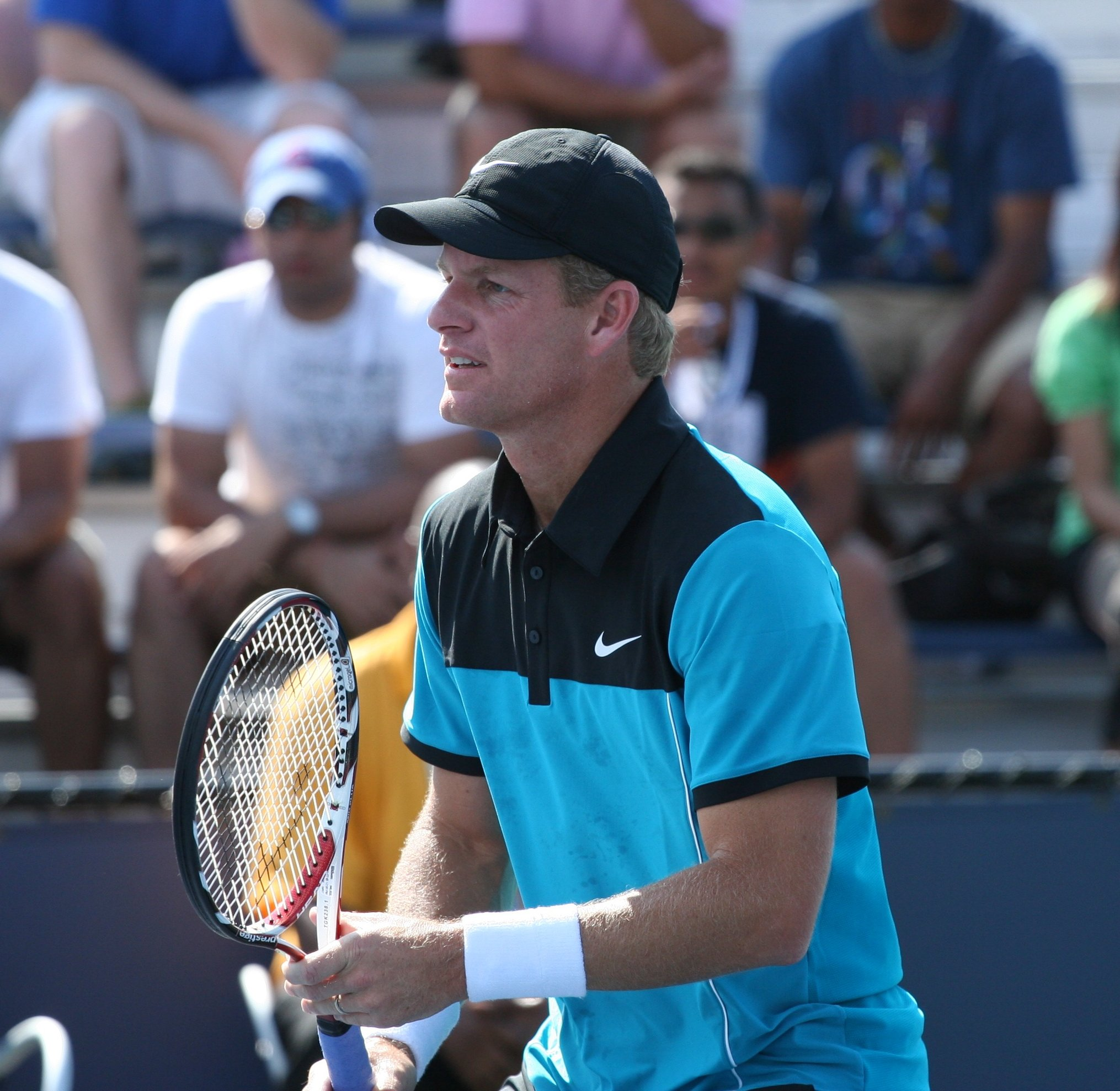 U.S. Open Saturday, Sept. 5, 2009